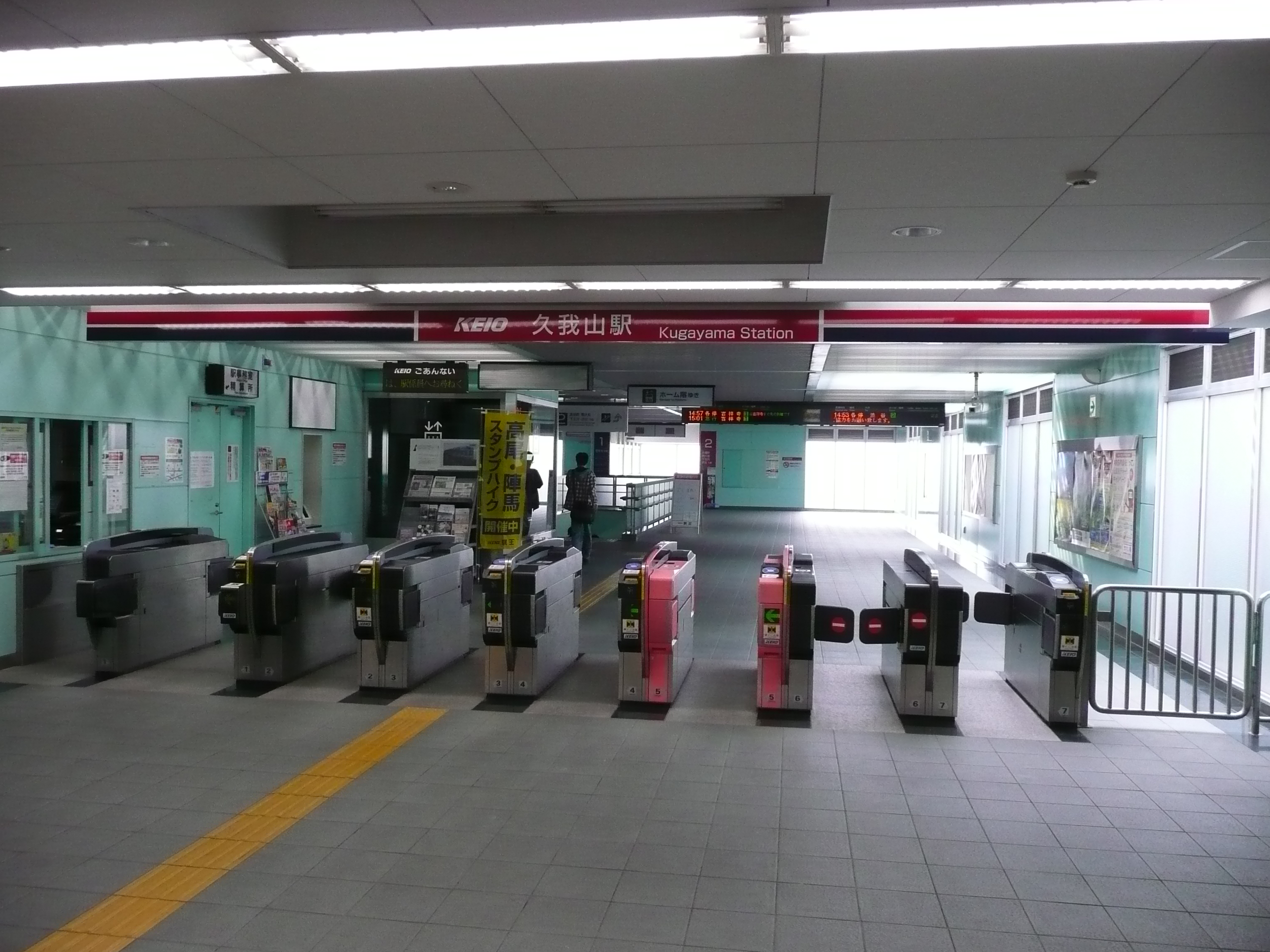 久我山駅改札口